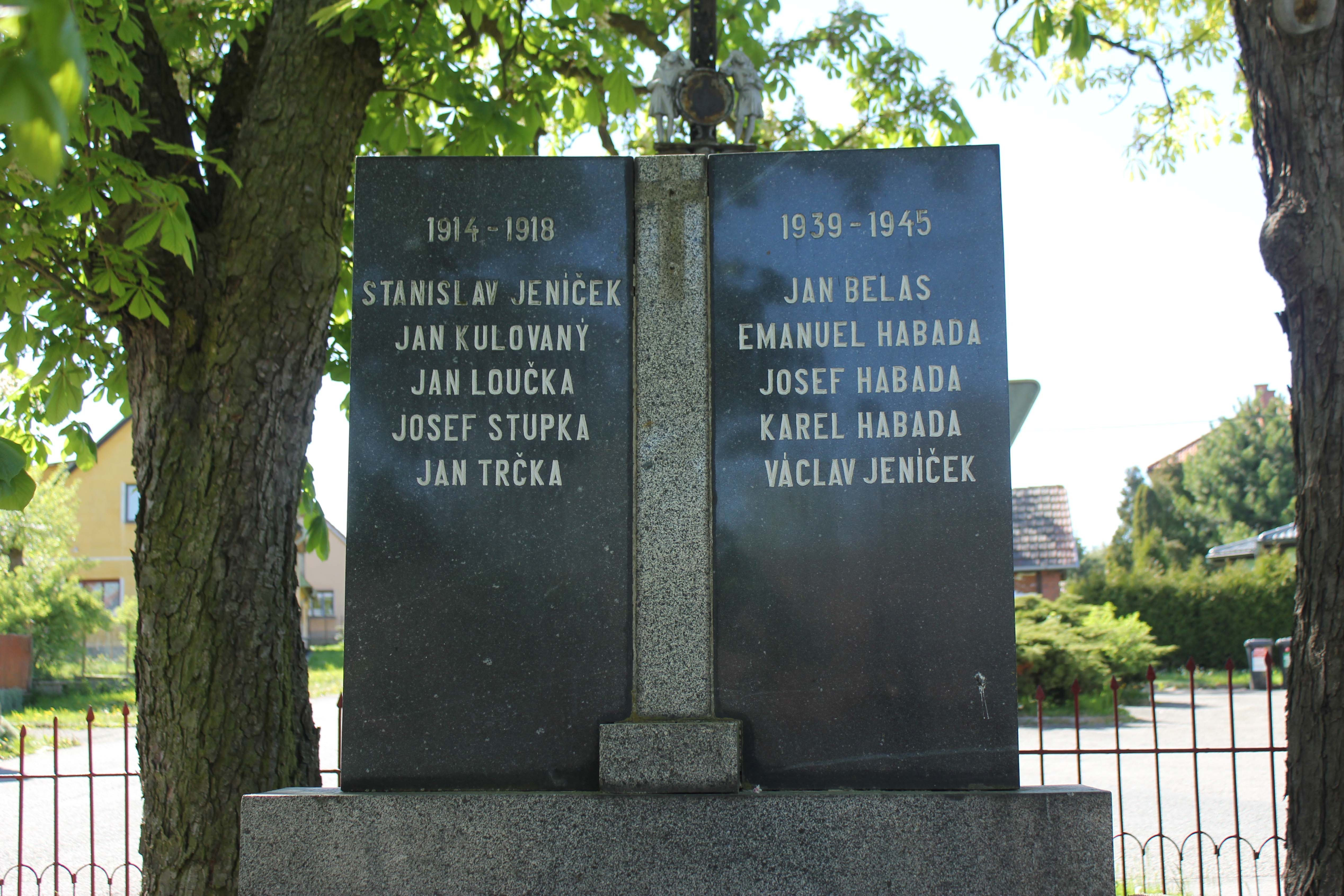 Pomník, Bězděkov pod Třemšínem